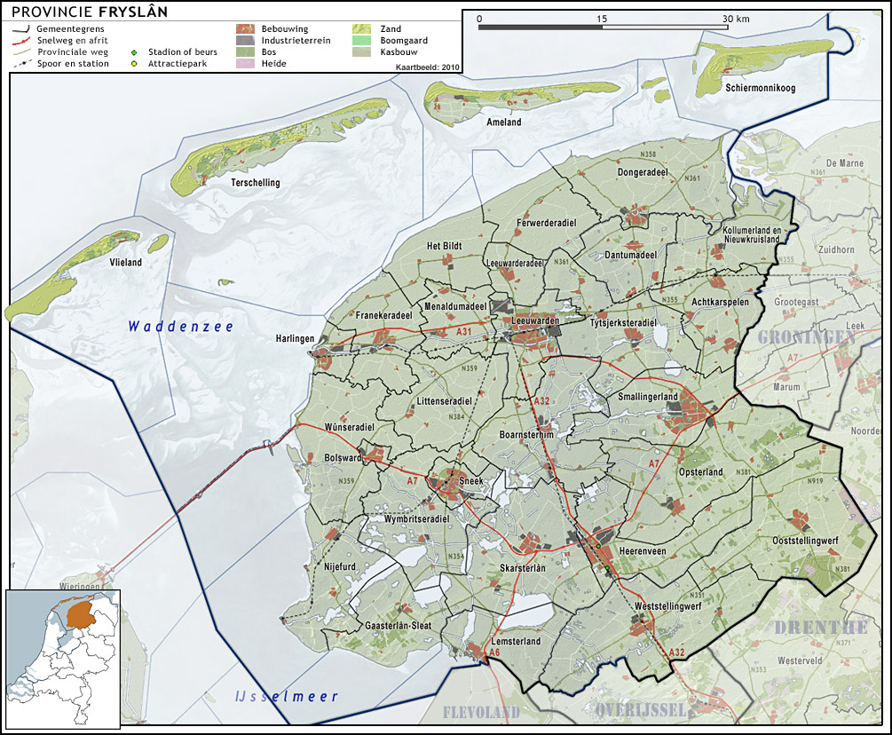 Provincie Fryslân, met indeling van gemeenten (2010) en impressie van het landschap. Door Jan-Willem van Aalst, samengesteld uit publiek beschikbare geo-data: Referentie-ondergrond (kustlijn, steden, wegen) gerasterd uit de OpenStreet Map OSM. ( Inhoud is beschikbaar onder de Creative Commons Attribution-ShareAlike 3.0 license. Referentie-ondergrond op water bewerkt vanuit Gebruik is vrij met bronvermelding NLR en ESA. Vectorgrenzen van gemeenten en regio's vrij ter beschikking gesteld met dank aan cartografen van brandweerregio's Hollands-Midden en IJsselland; gerasterd in Photoshop. Hoogte-aanduidingen (reliëf) gerasterd uit de AHN Viewer ( gebruik is vrij met bronvermelding (c) AHN, Overige kenmerken op de kaart: eigen tekenwerk van Jan-Willem van Aalst, op basis van gerasterde gemeentegrenzen.